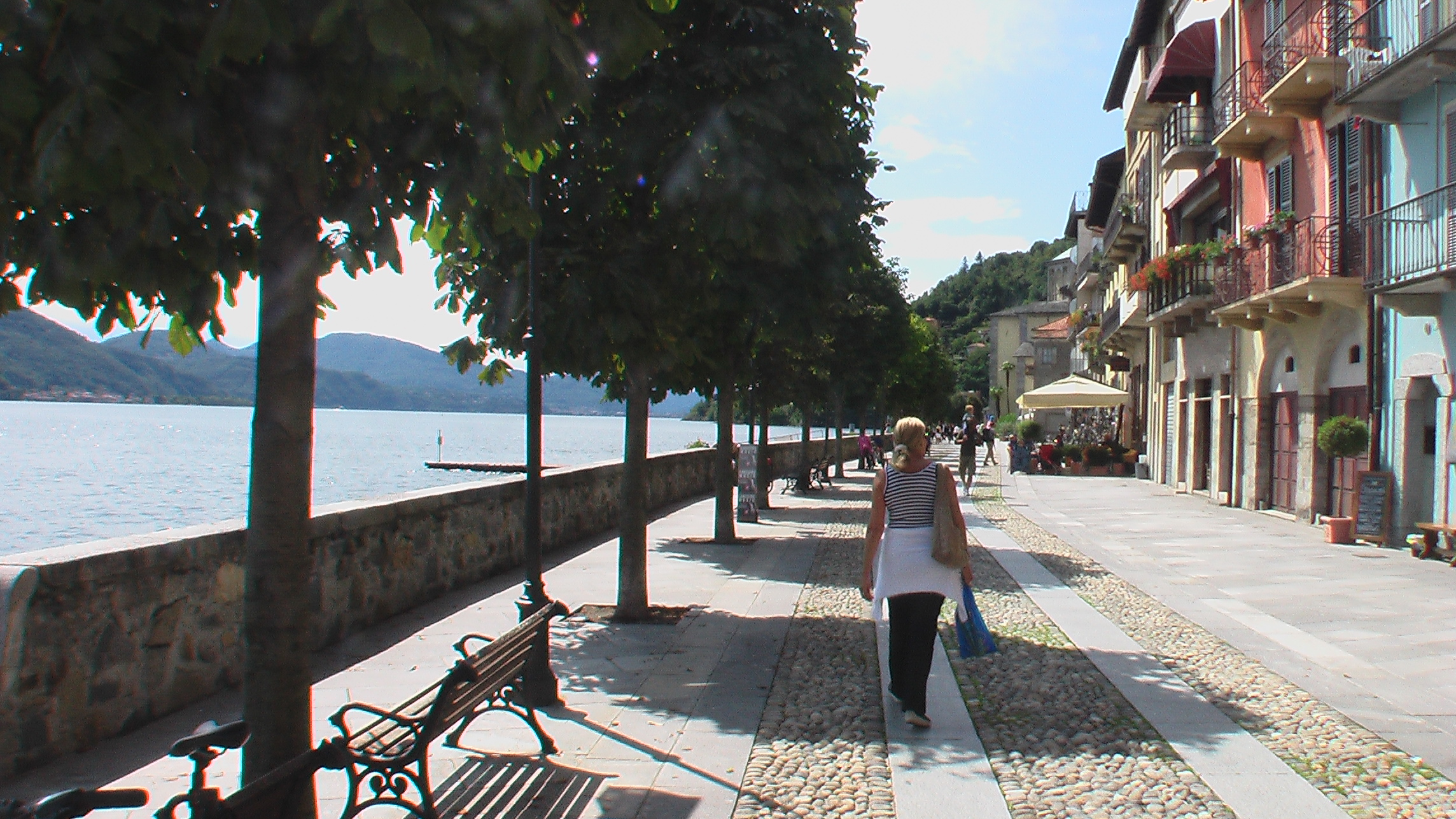 Cannobio Uferpromenade